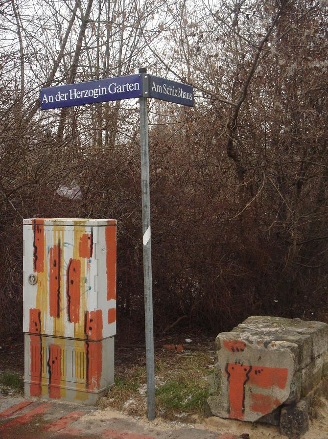 Blick auf das verwilderte Gelände in der Herzogin Garten, Wilsdruffer Vorstadt, Dresden